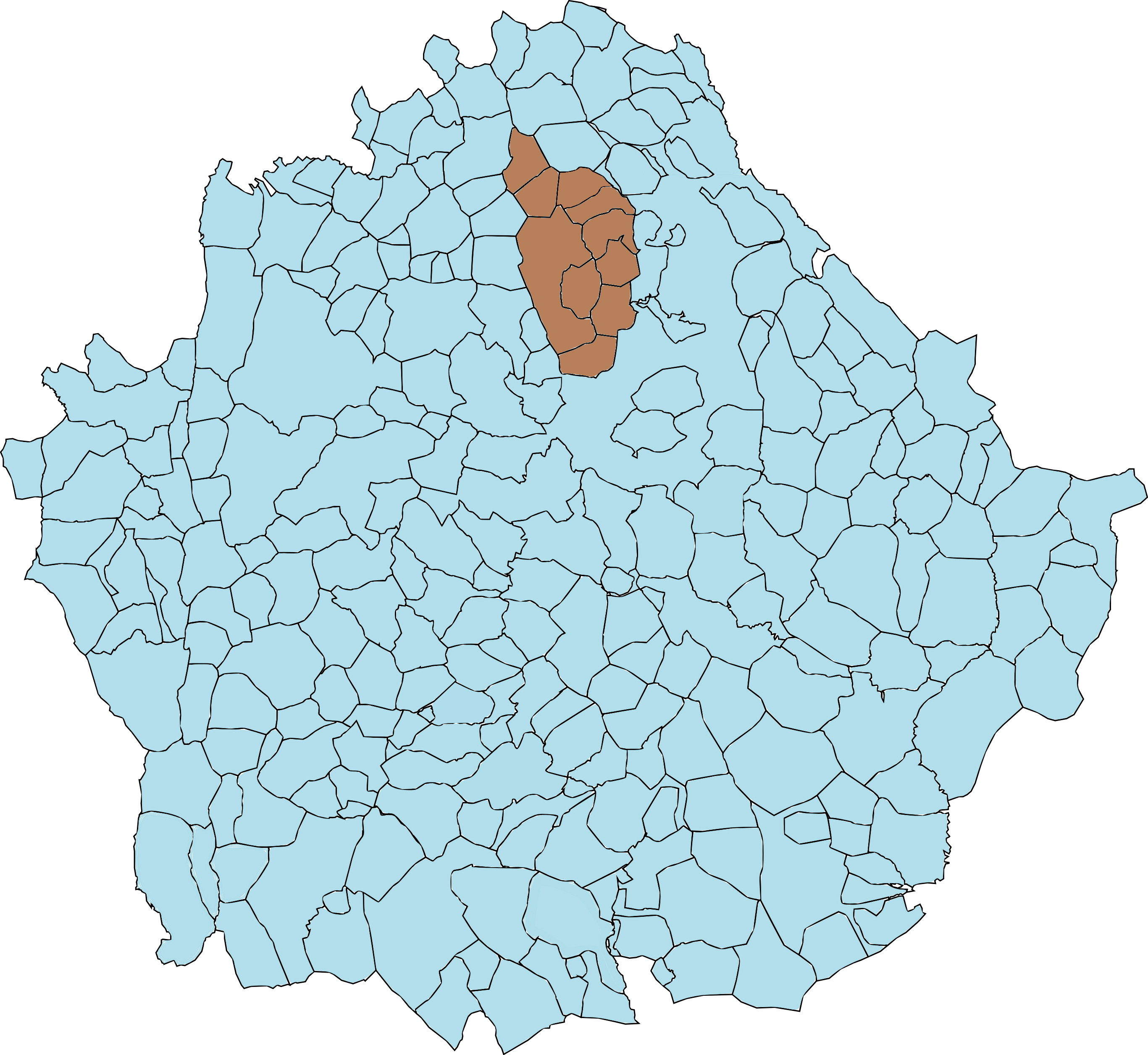 Campo de Ribatajada (Campichuelo)